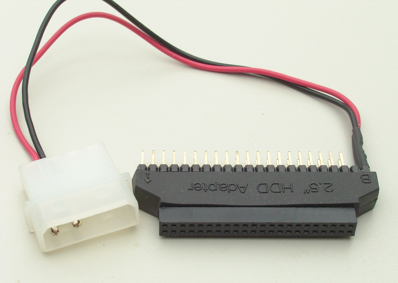 Adapter, um 2.5"-Festplatten an 40-polige Standardports anschließen zu können. Stromversorgung der Notebookplatte über separaten Stecker.